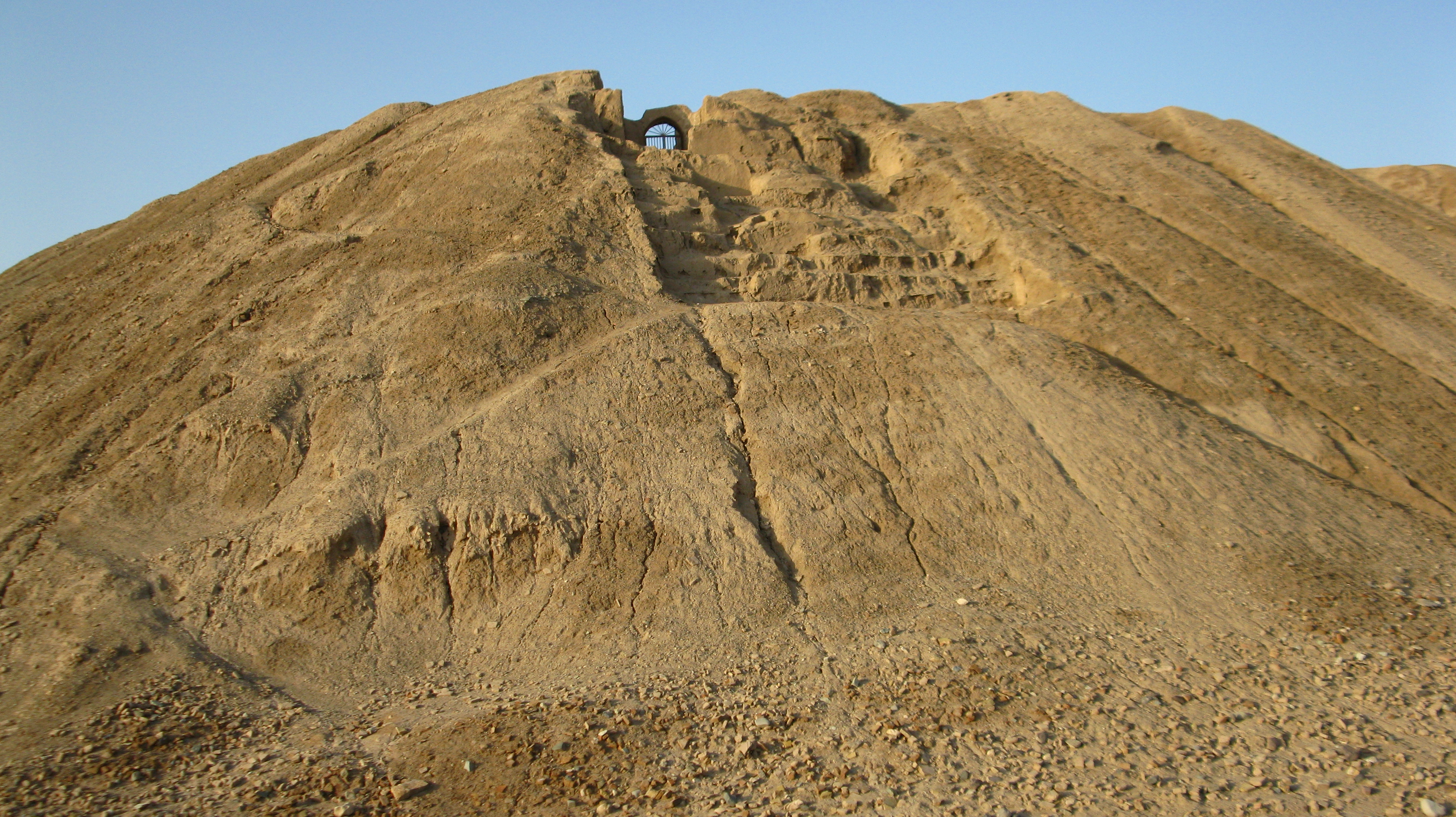 تپه باستانی آوه و خرابه‌های اطراف آن